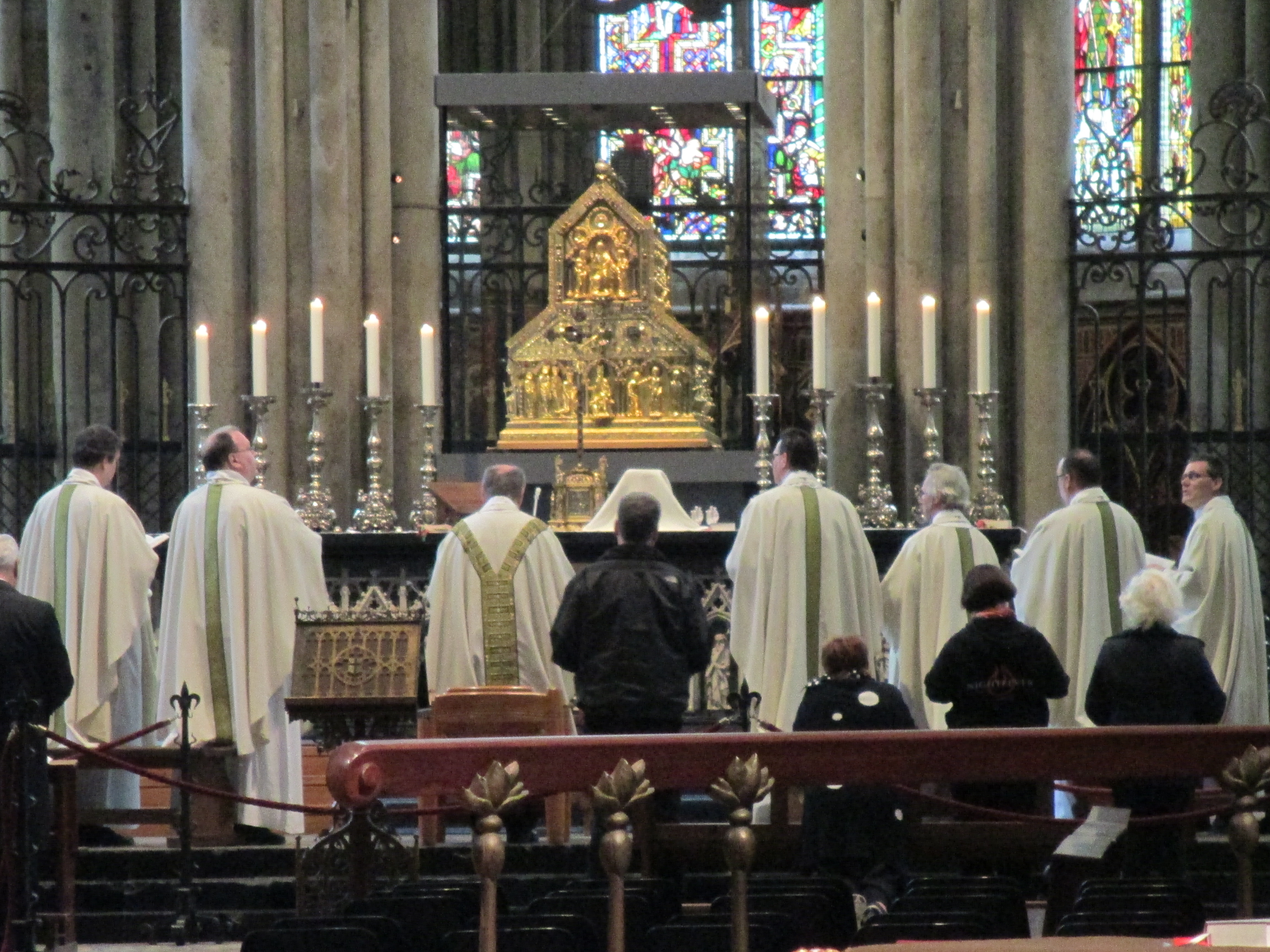 מקדש שלושת האמגושים בקתדרלת קלן